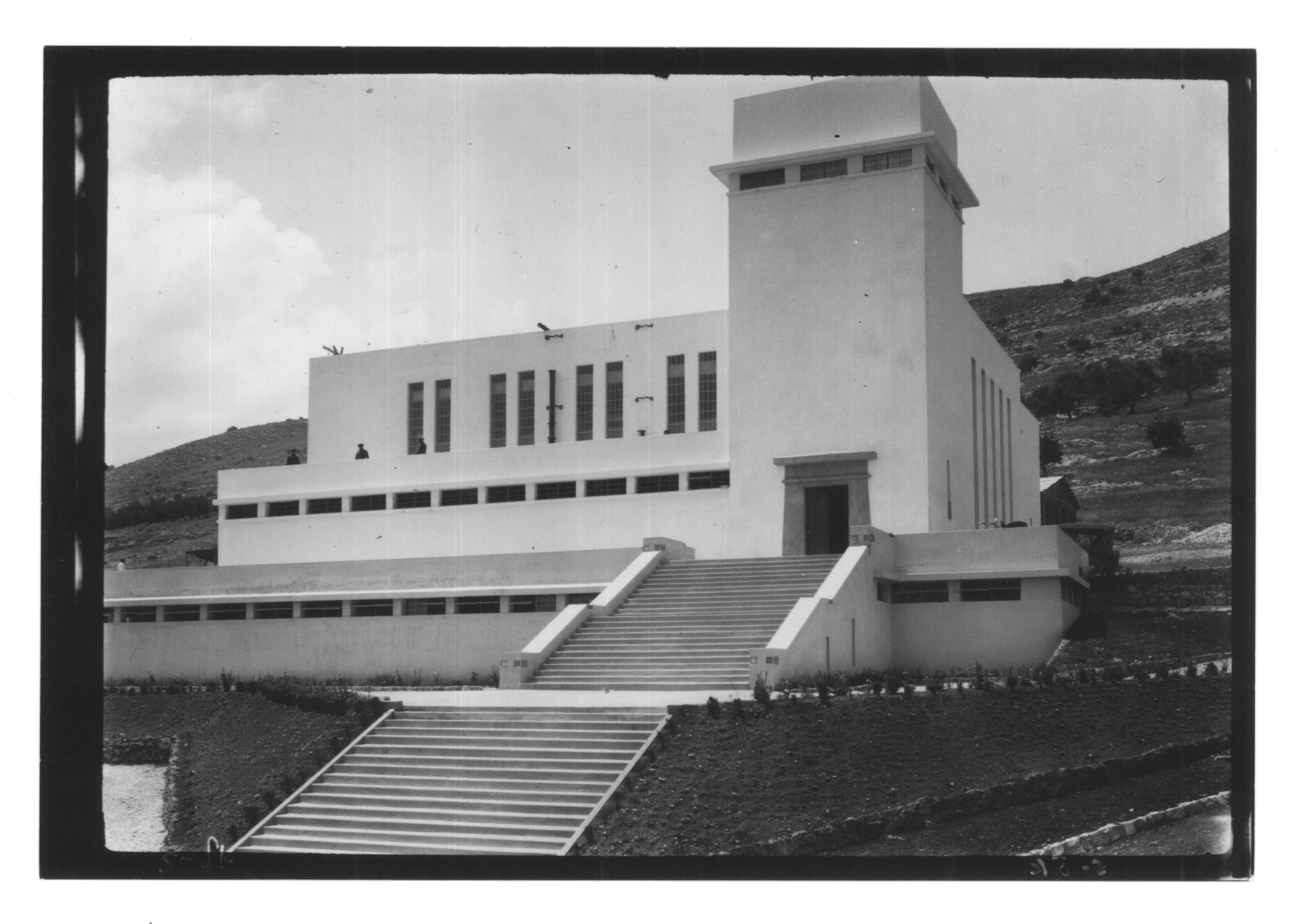 תיעוד תחנת הכוח הראשונה בחיפה